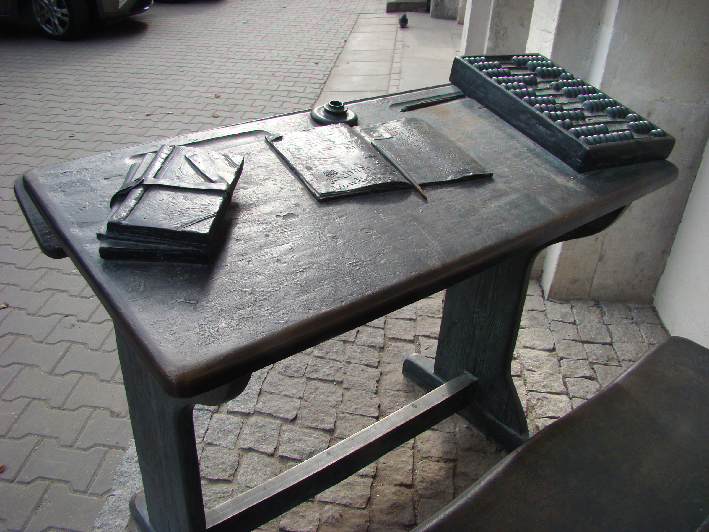 Pomnik ławki szkolnej - Wybrzeże Kościuszkowskie